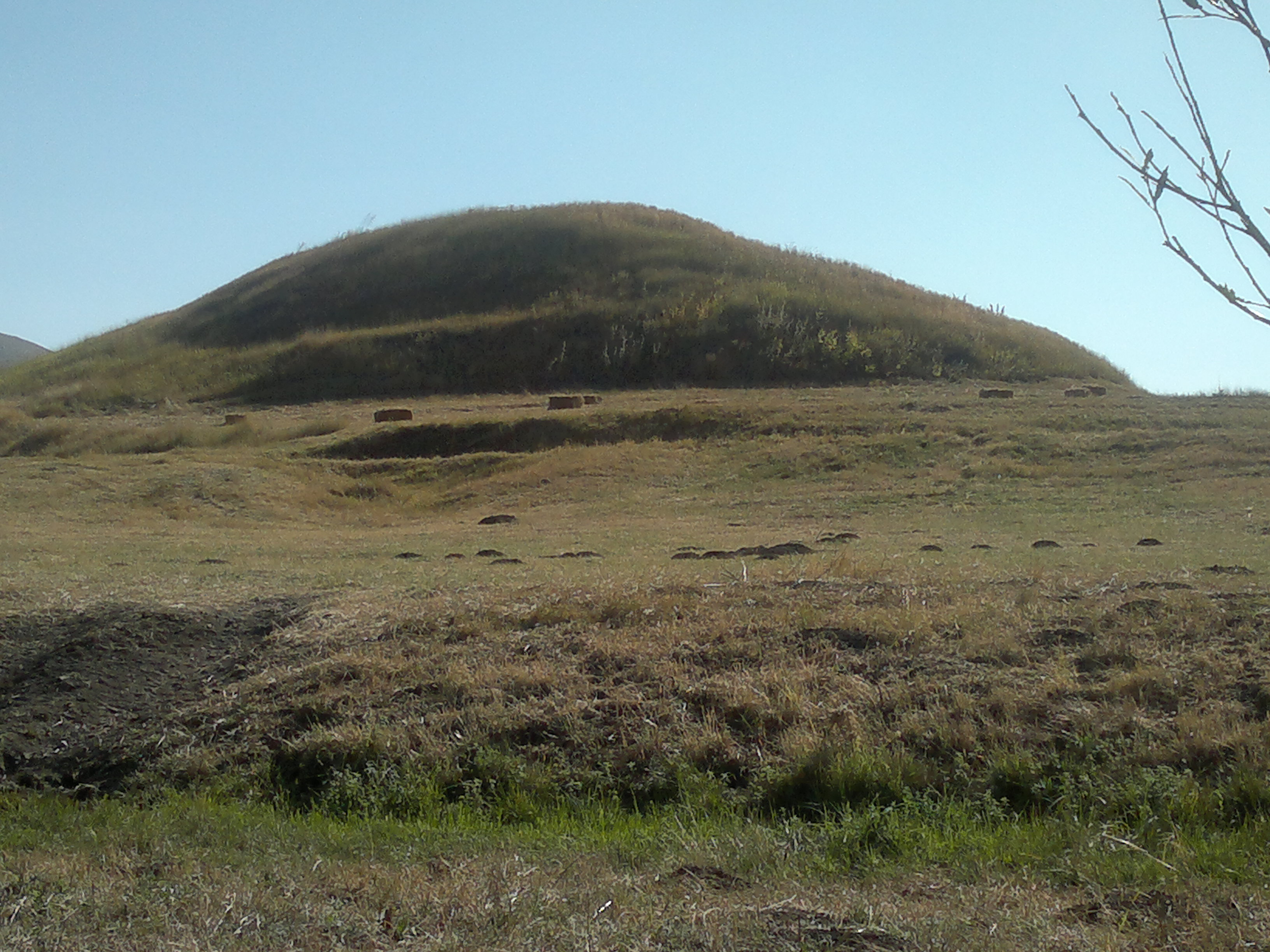 Türkiye'de Erzurum ili merkez Aziziye (eski adı:Ilıca) ilçesine bağlı Alaca köyü Alacahöyük